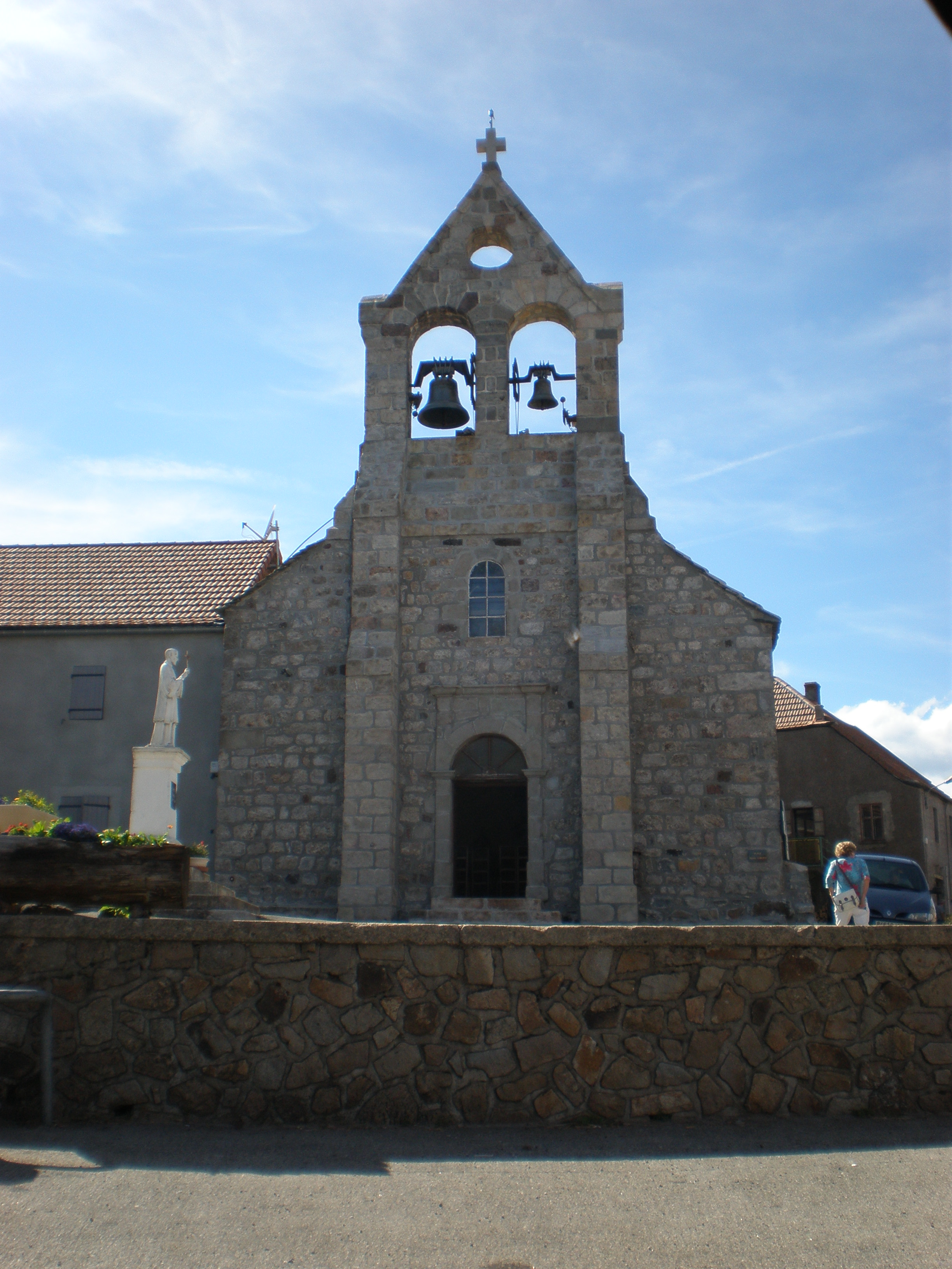 Eglise de Lachamp-Raphaël (Ardèche)